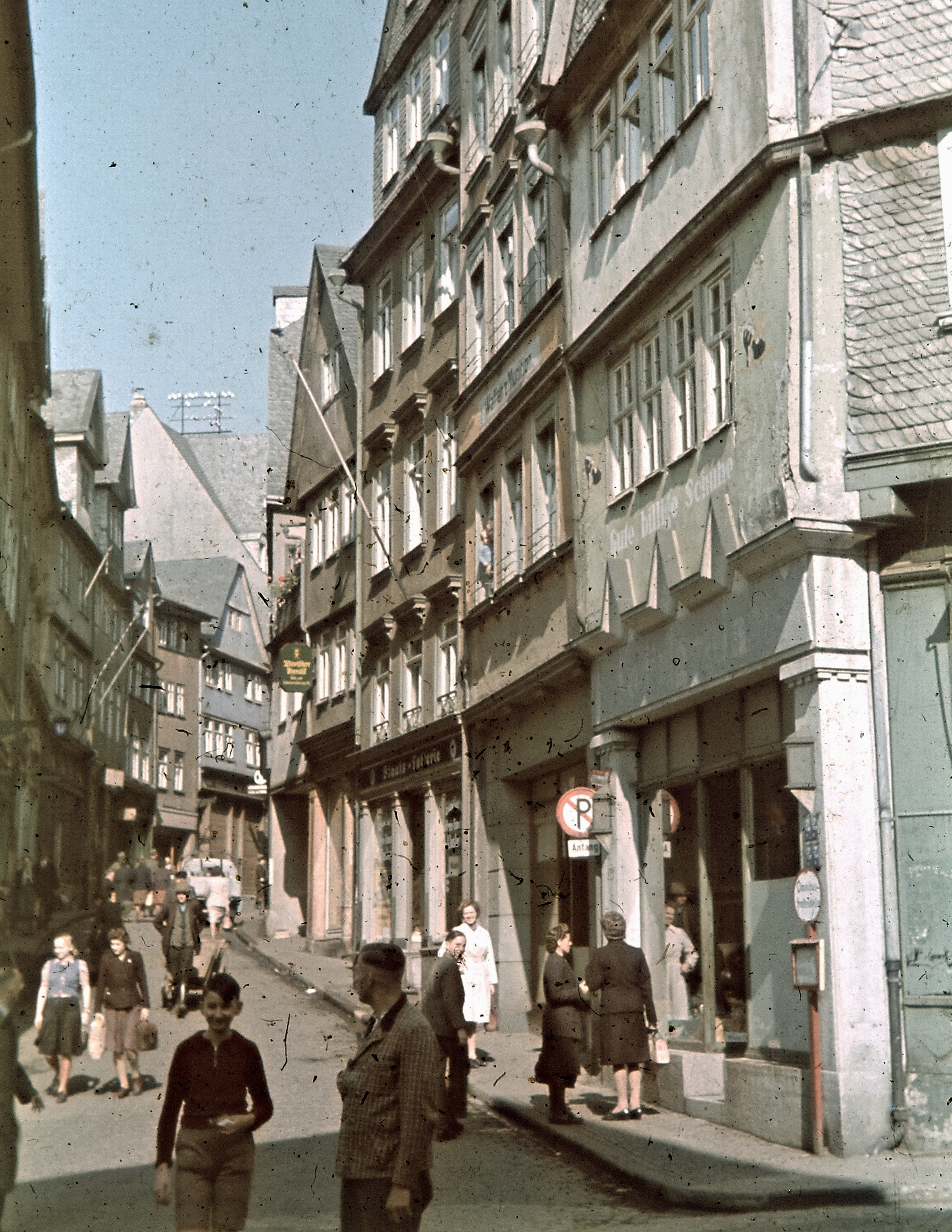 Krämerstrasse. Location: Germany Tags: colorful, street view Title: Krämerstrasse.